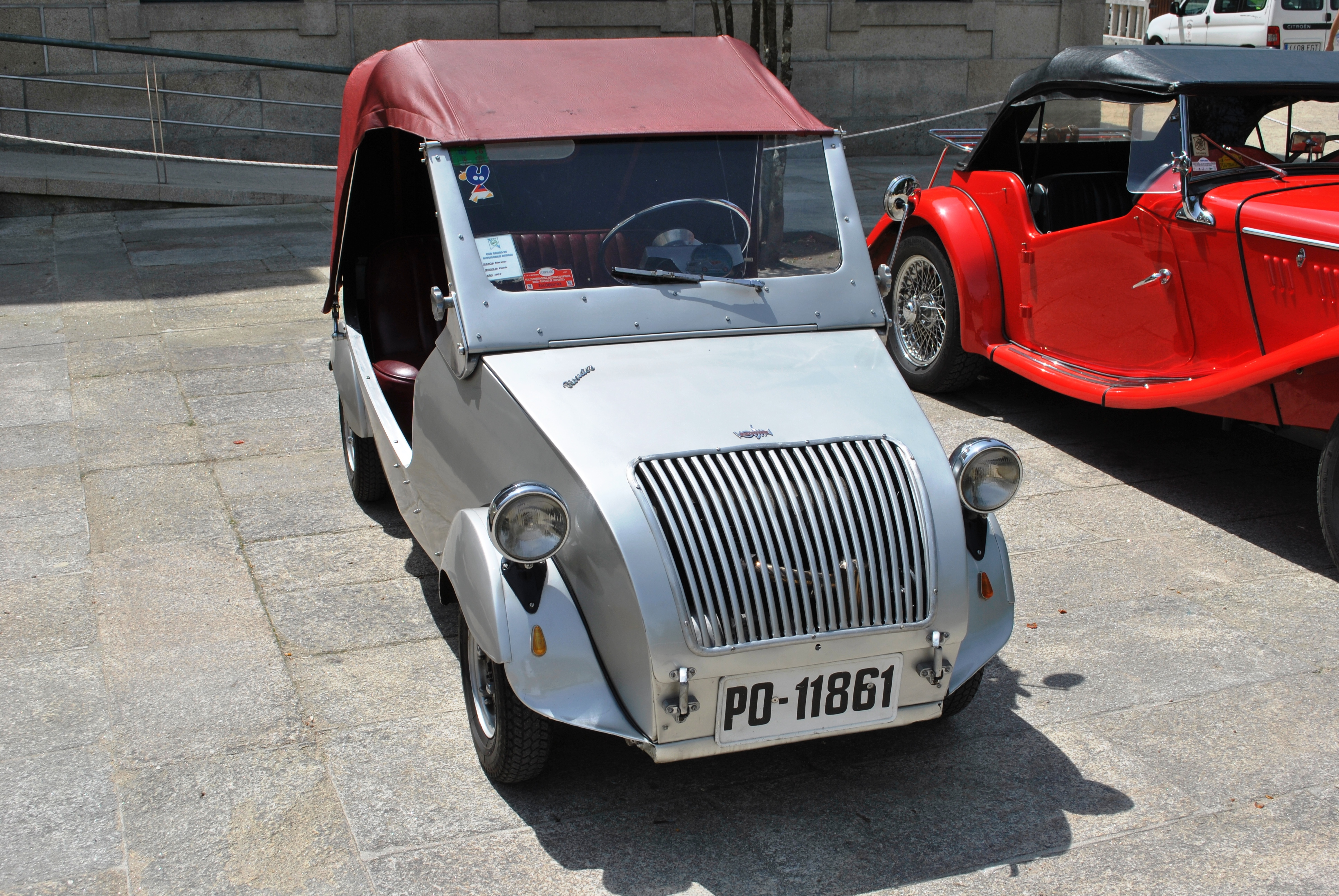 Véxase o título e as categorías.